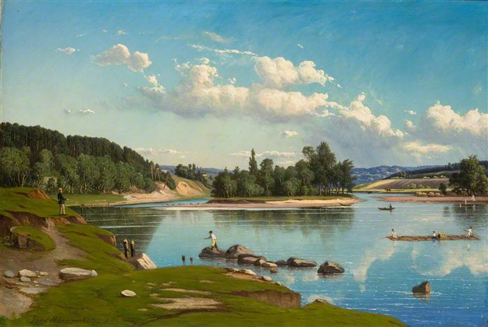 Беларуская (тарашкевіца): Вільня, Закрэт